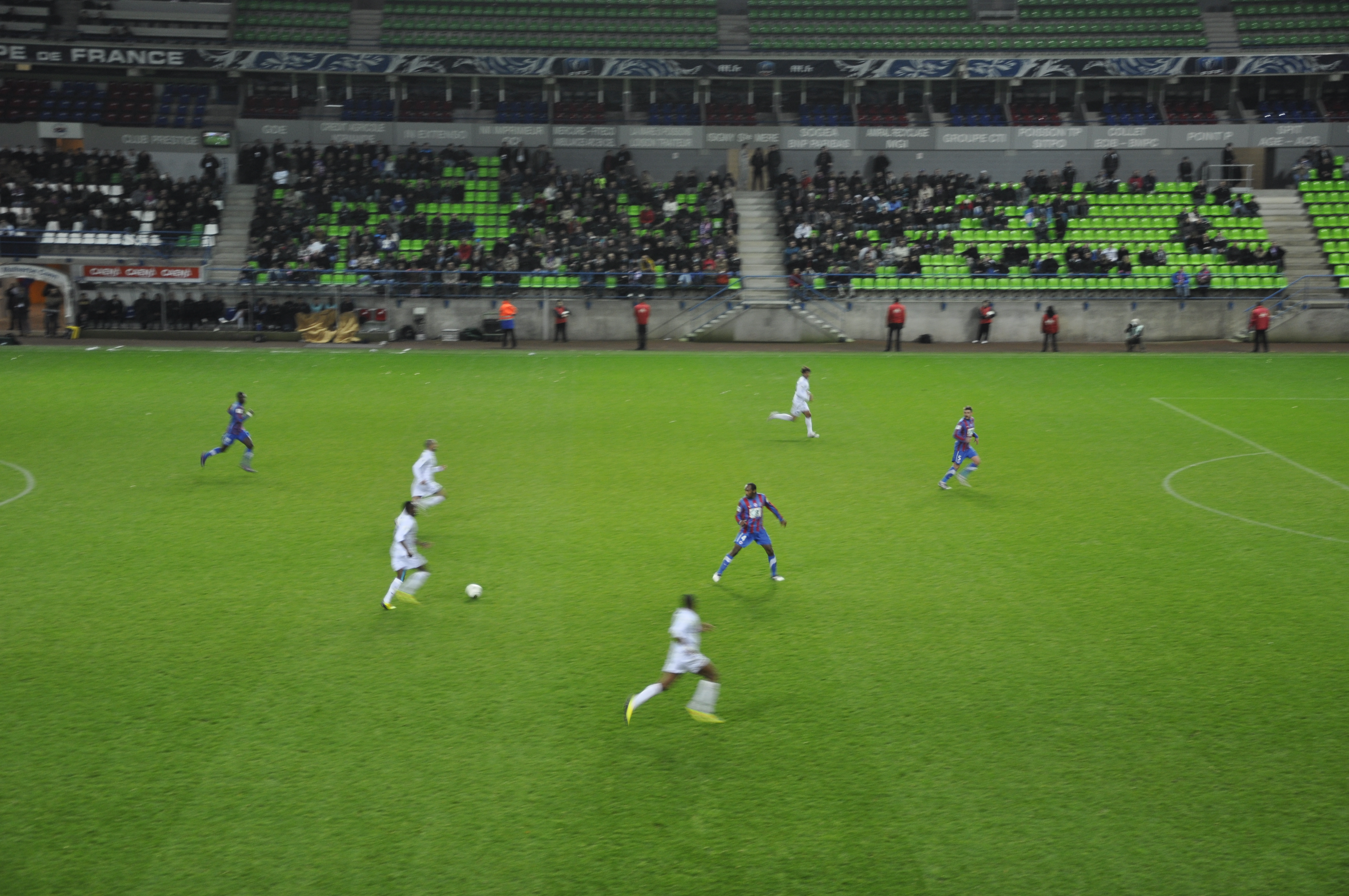 Match de coupe de France pour le compte des trente deuxième de finale entre le SM Caen et l'ESTAC le 7 janvier 2012